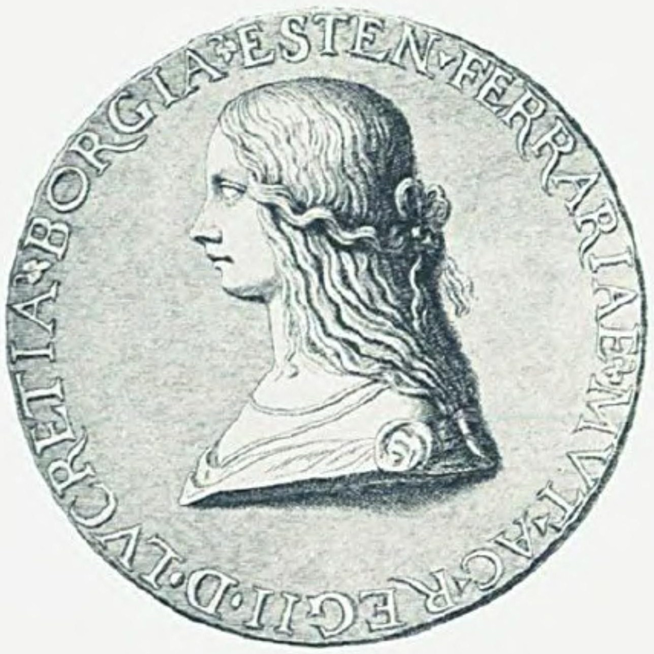 Medalje med bilde av Lucrezia Boriga, ukjent opphavsmann